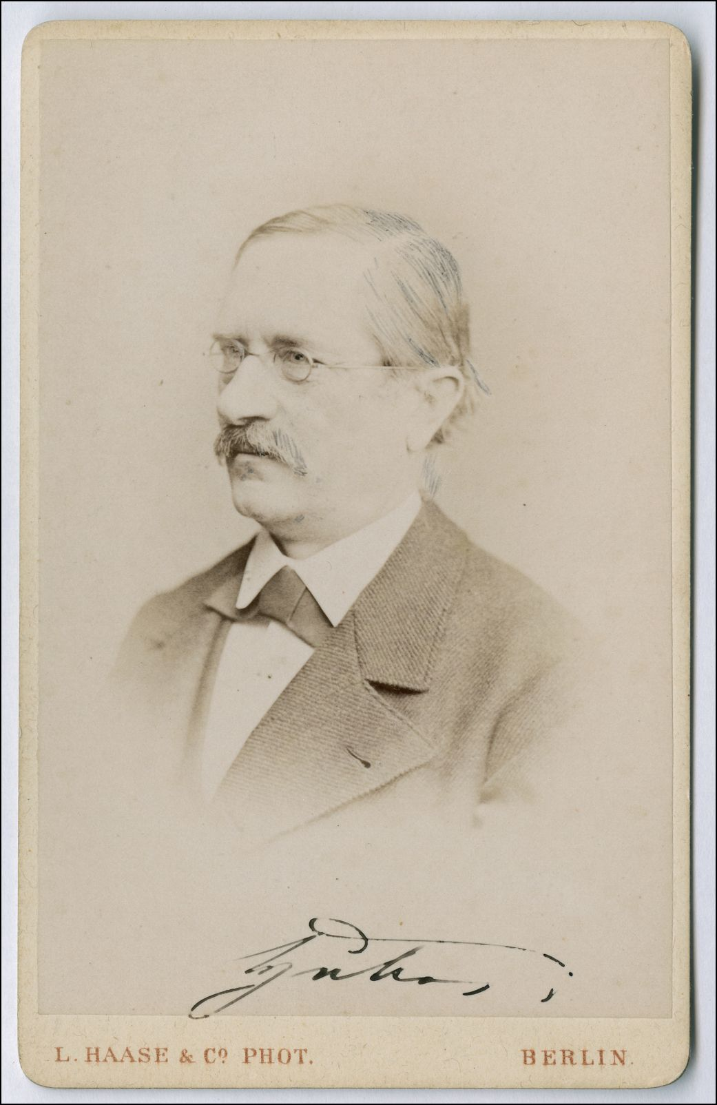 Gottlieb von Huber (1817–1882), Landgerichtspräsident in Heilbronn